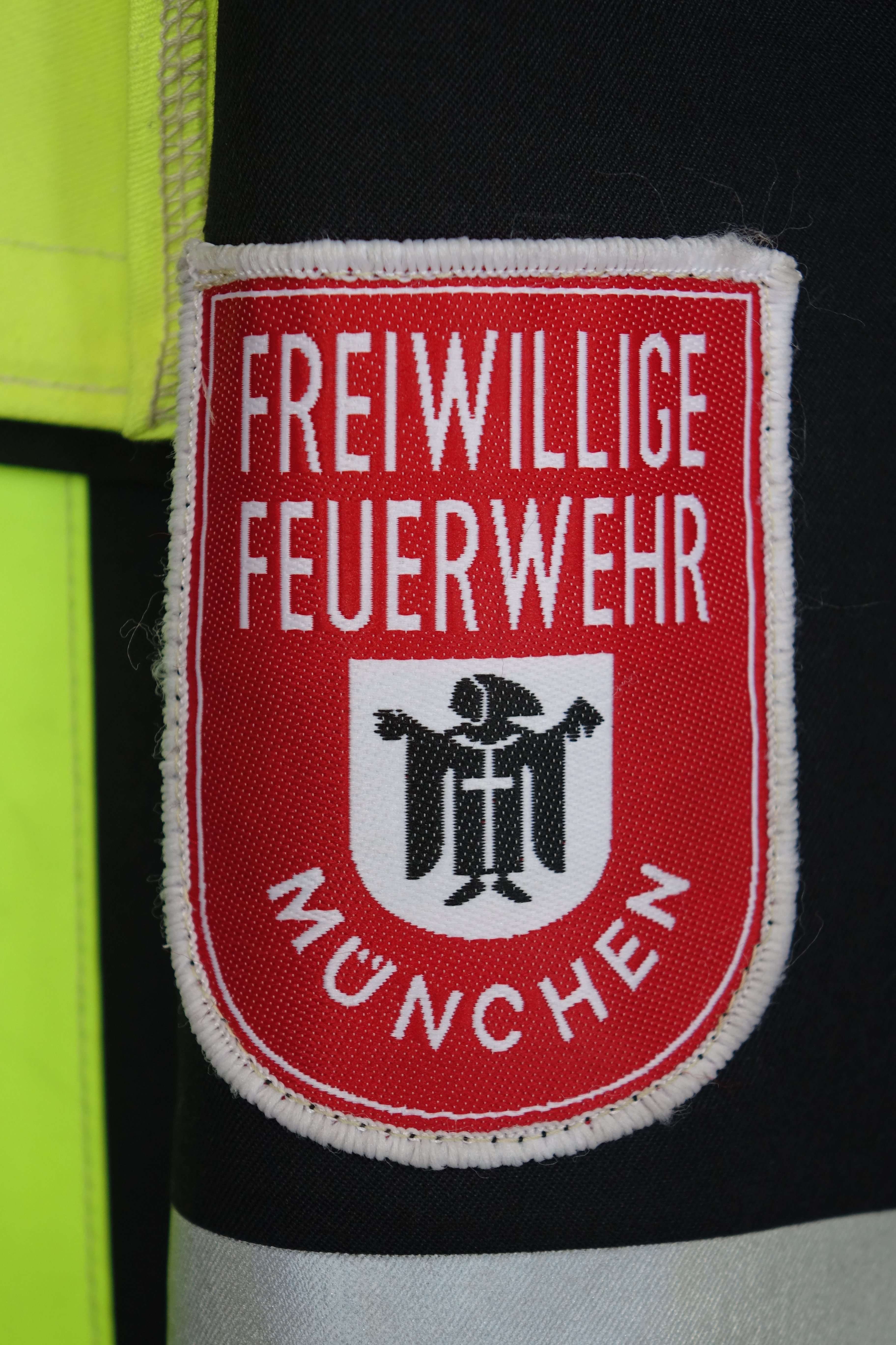 Freiwillige Feuerwehr Munich, Germany